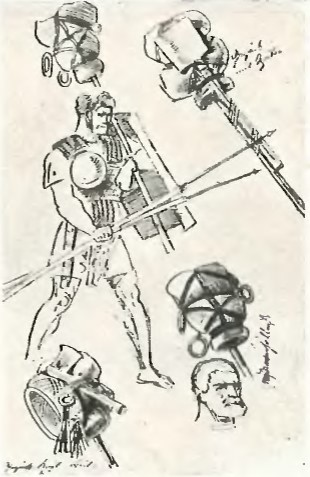 Szkic do przedstawienia Hermannsschlacht